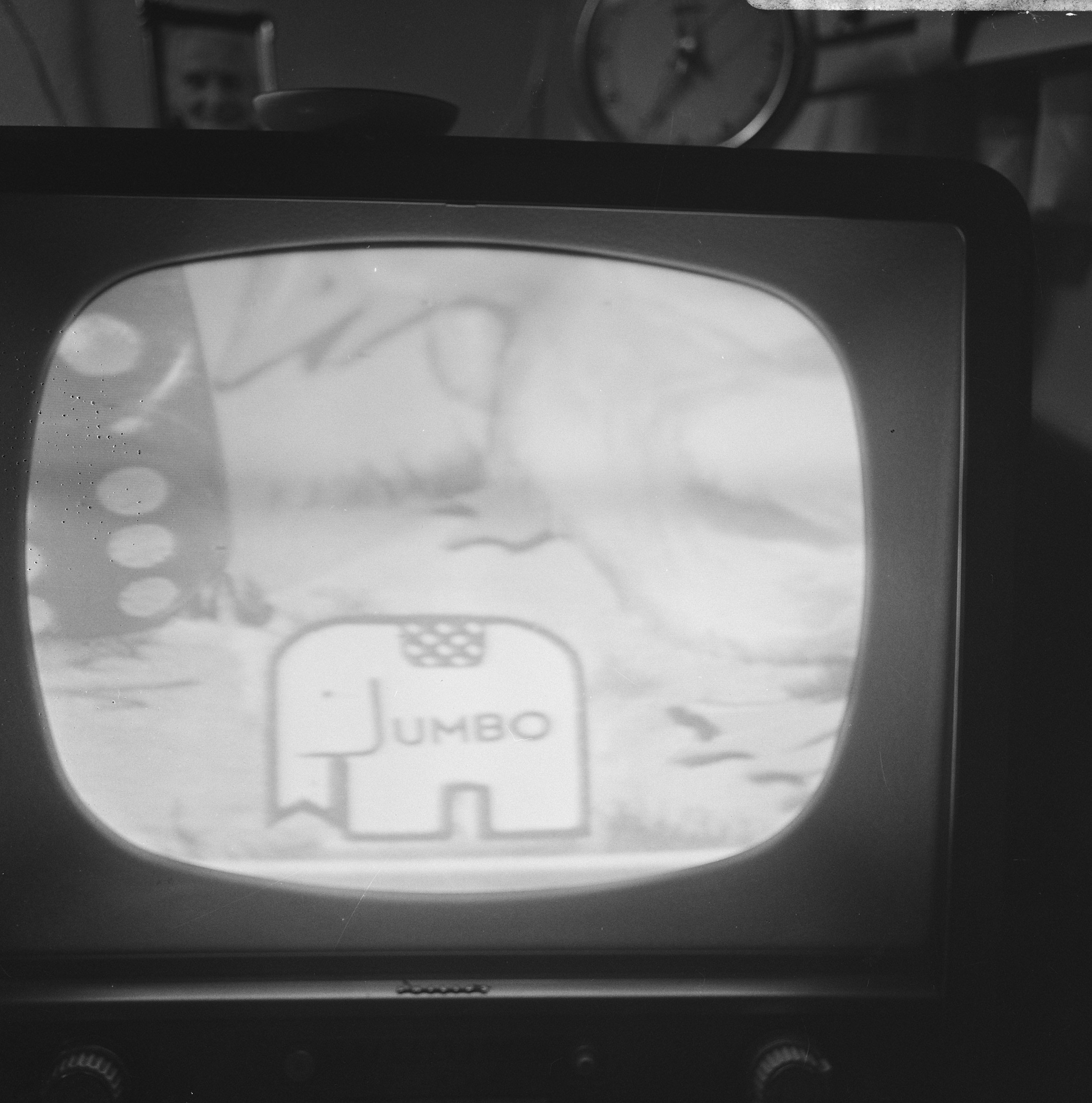 Collectie / Archief : Fotocollectie Anefo Reportage / Serie : [ onbekend ] Beschrijving : Eerste reclamespots op TV, reclame Jumbo-spelen Datum : 2 januari 1967 Trefwoorden : reclamespots Fotograaf : Merk, Ben / Anefo Auteursrechthebbende : Nationaal Archief Materiaalsoort : Negatief (zwart/wit) Nummer archiefinventaris : bekijk toegang 2.24.01.03 Bestanddeelnummer : 919-9362